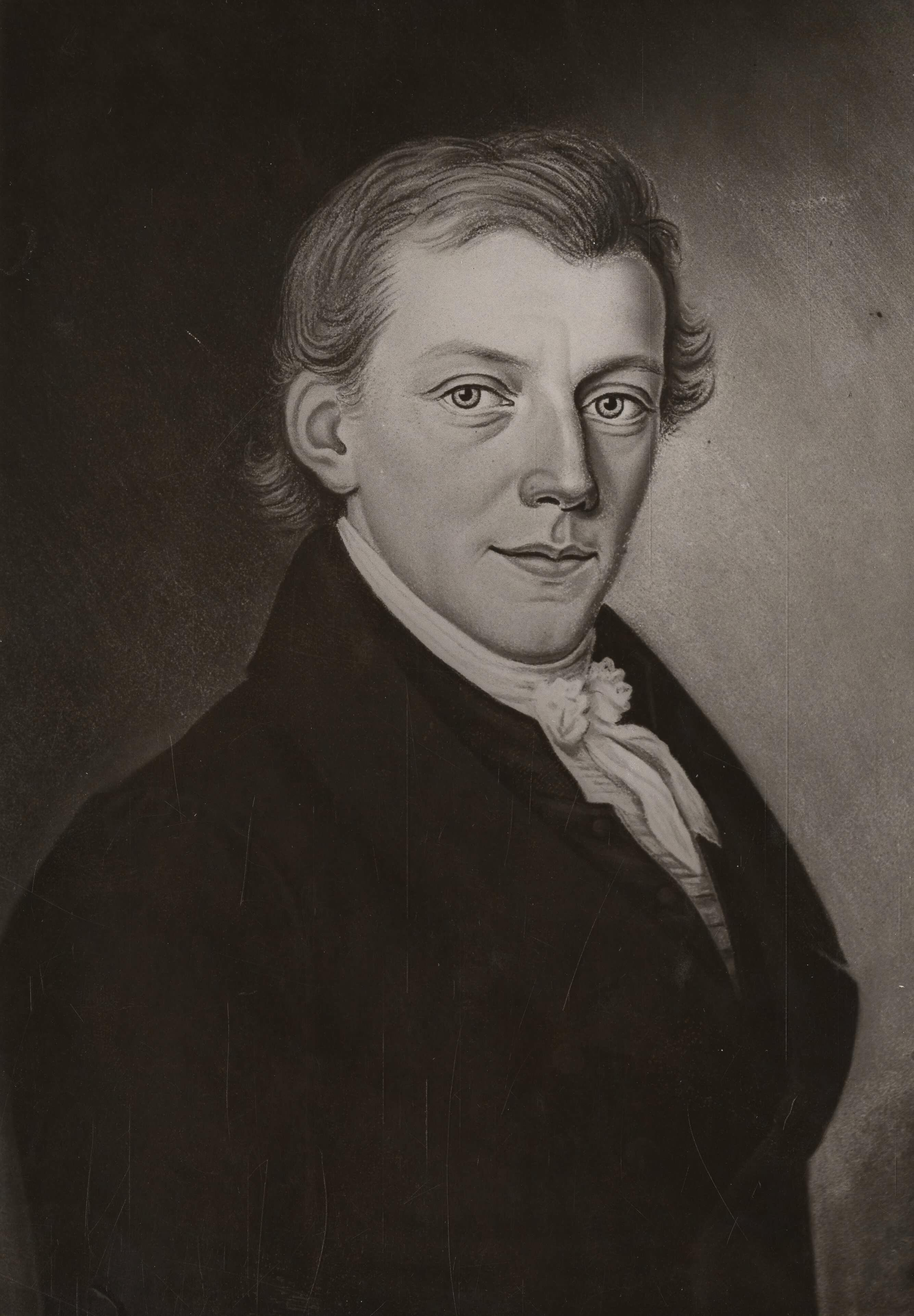 Portret van Marten Douwes Teenstra.